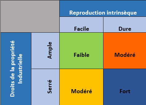 Explique le régime de qualification des capacités dynamiques